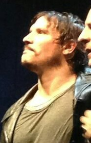 "Lluvia Constante" Teatro Bellas Artes de Madrid